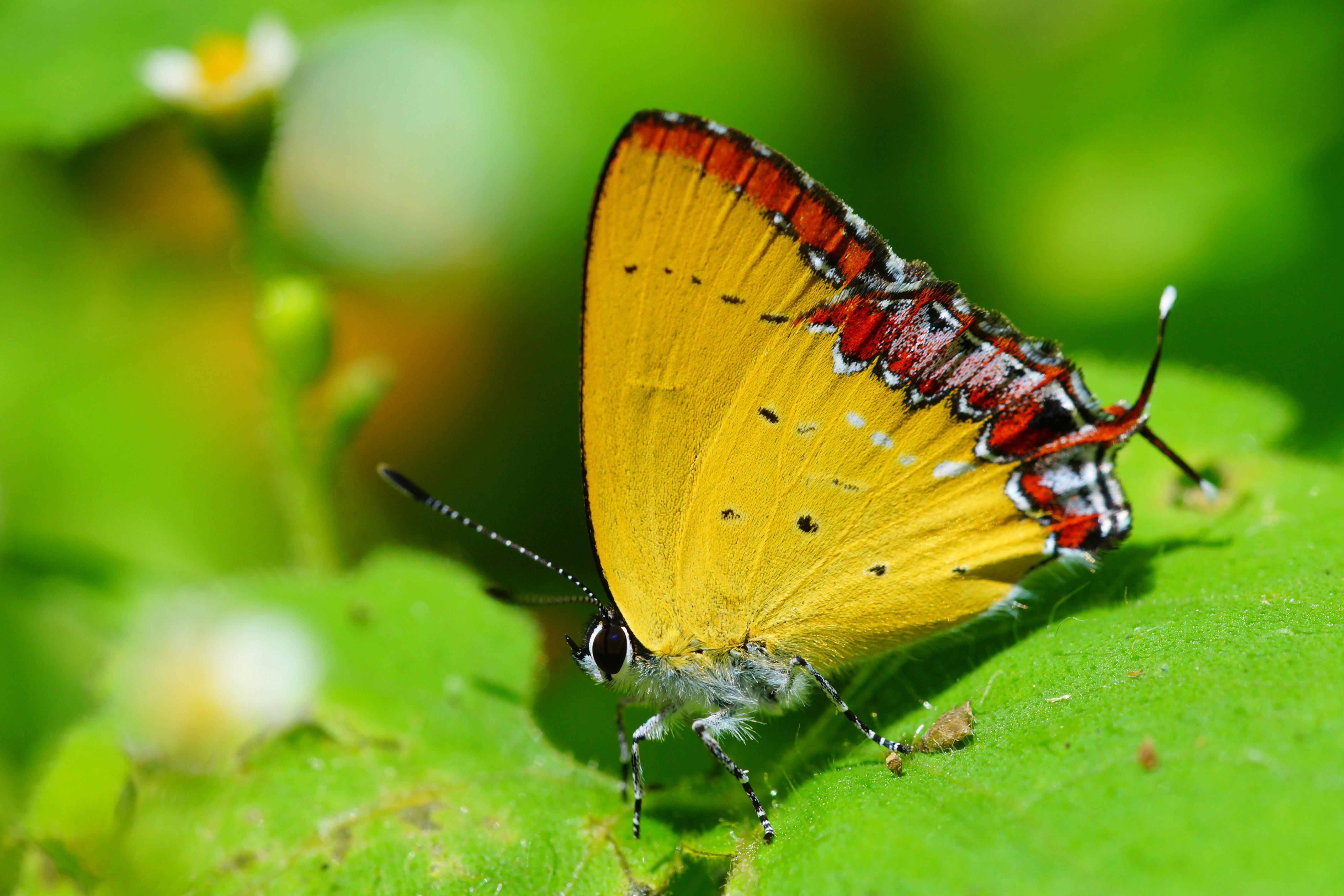 紫日灰蝶 Heliophorus ila matsumurae